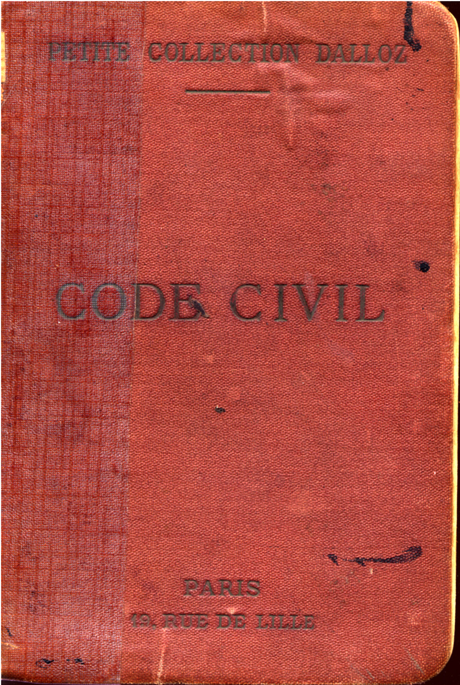 Code Napoléon